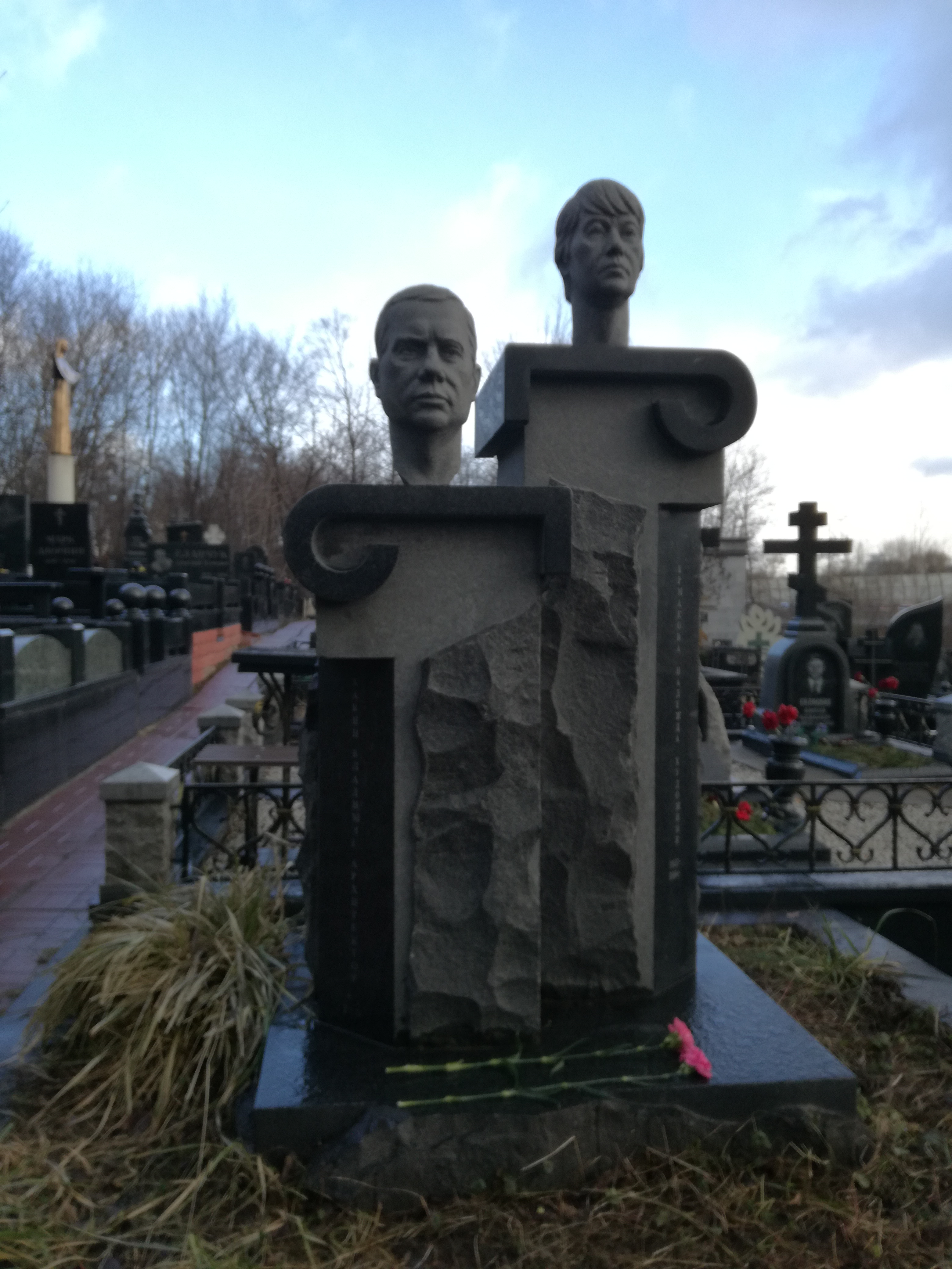 Даниловское кладбище